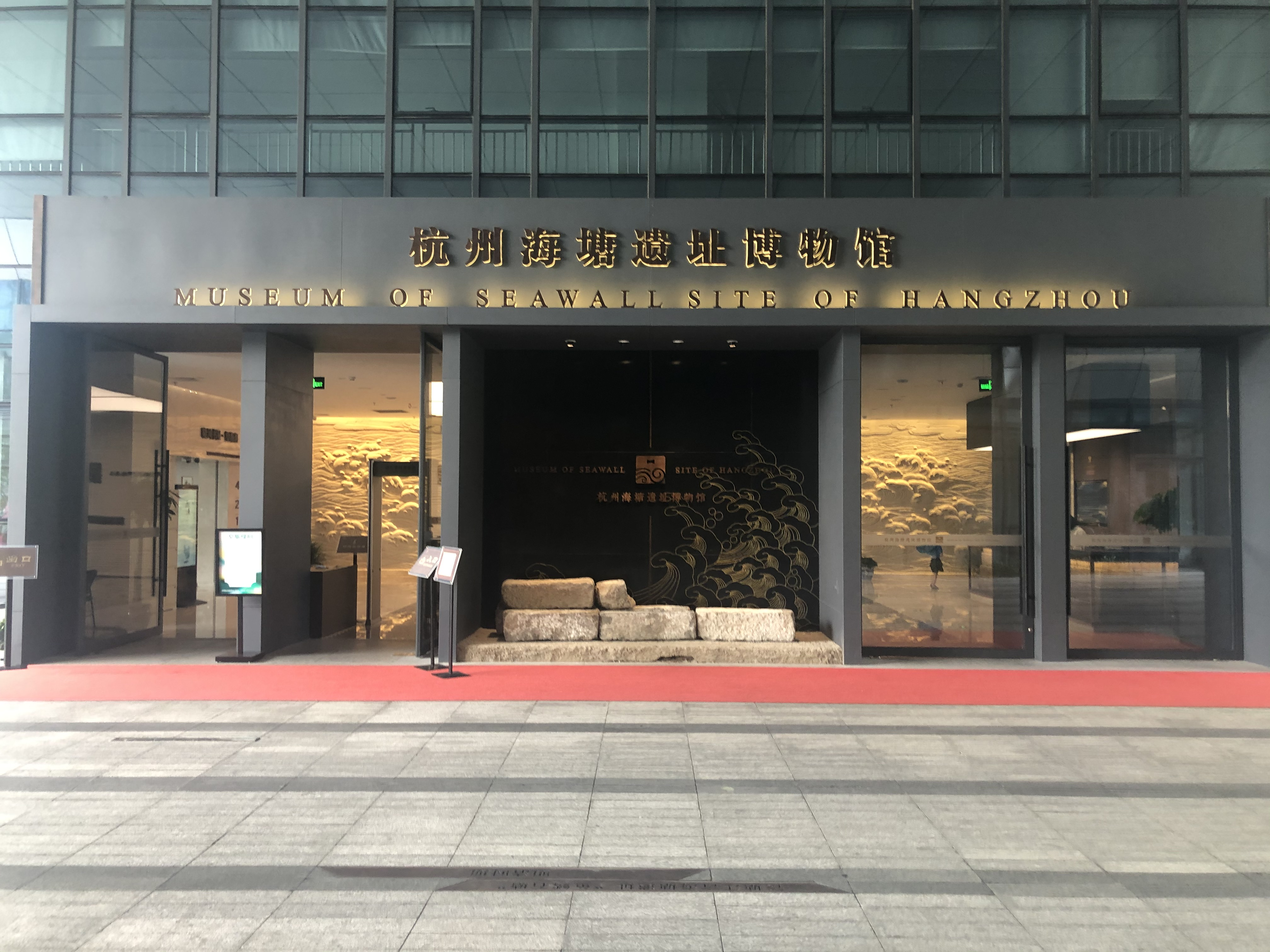 杭州海塘遗址博物馆正门入口